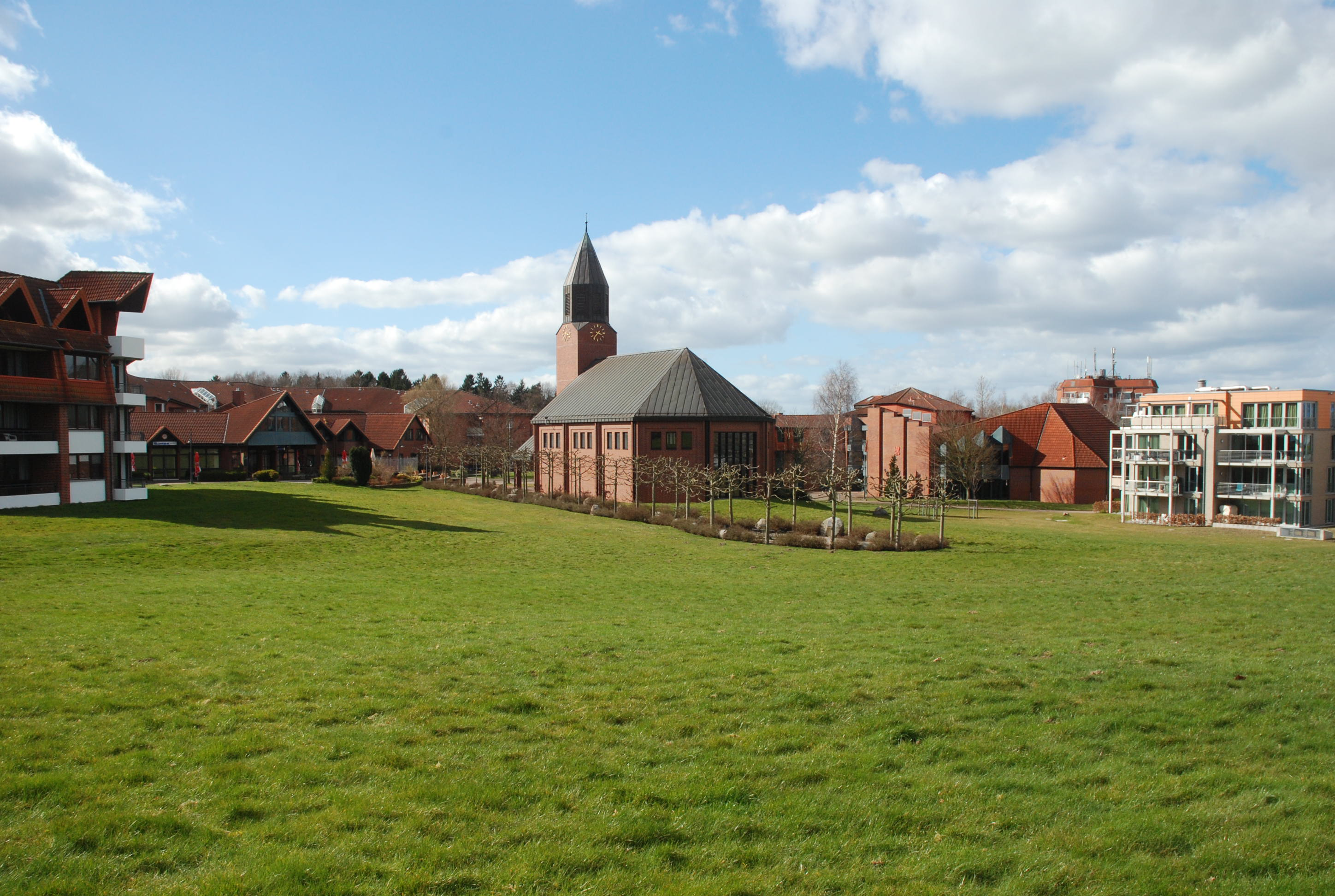 Blick auf das Pommernzentrum